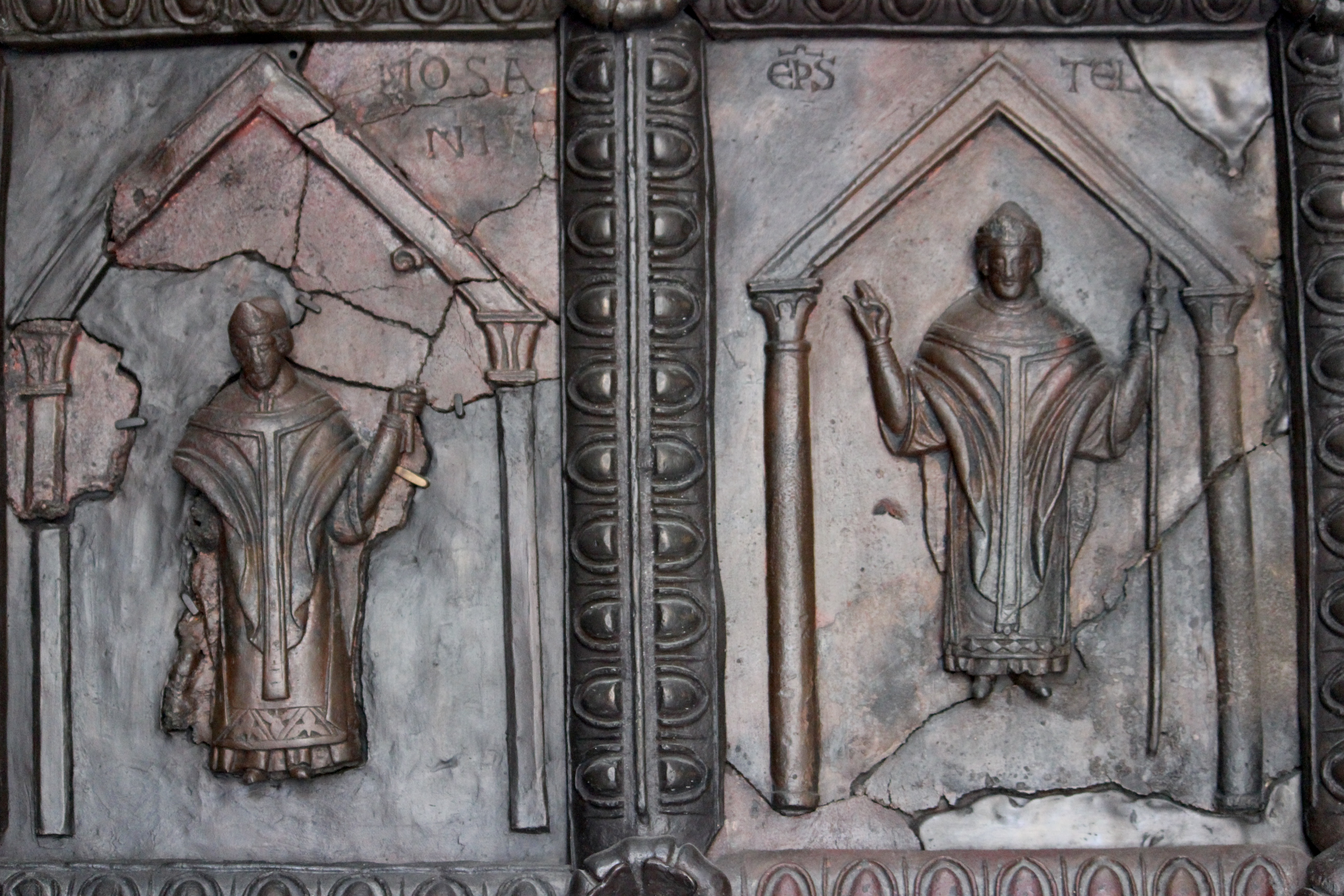 Benevento. Catedral, puerta de bronce románica, atribuida (al menos en parte) a Oderisio da Benevento. s. XII.